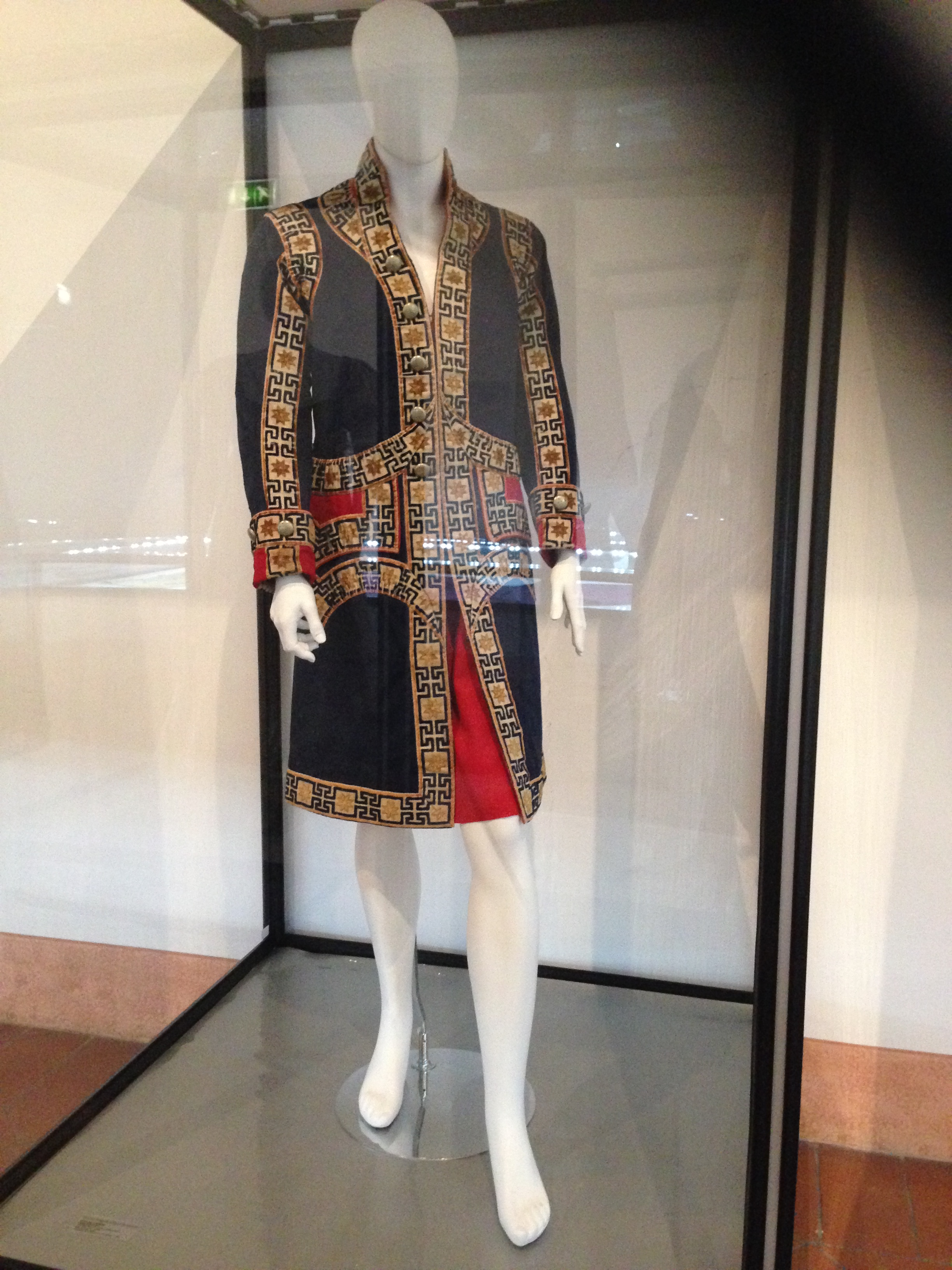 Livrea da valletto di carrozza, in panno di lana. Museo del tessile e del costume. Spoleto